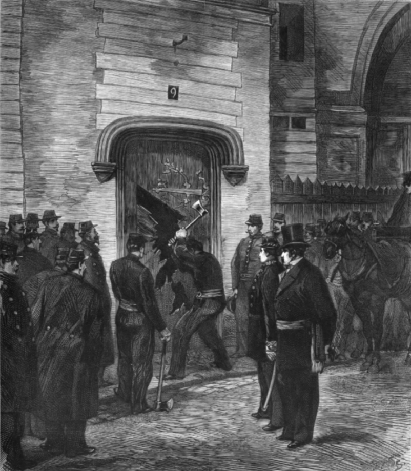 Des pompiers enfonçant la porte du couvent des Dominicains, rue Jean-de-Beauvais à Paris.